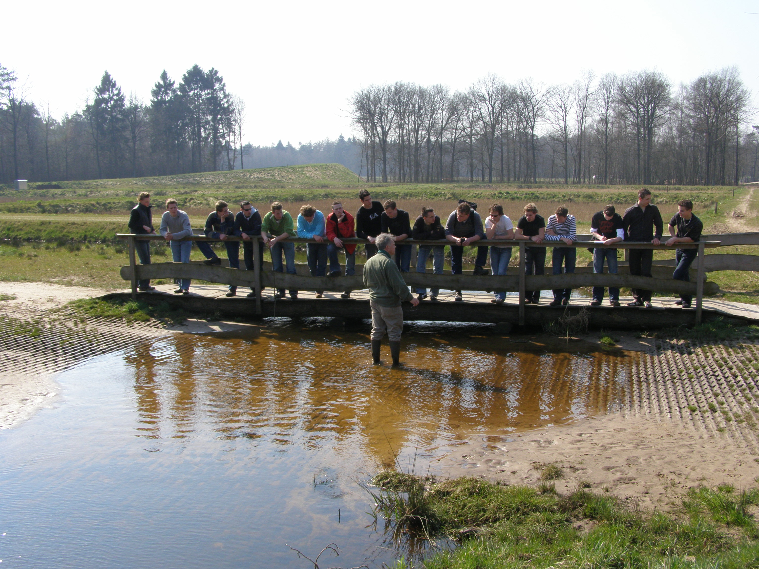 eigen werk